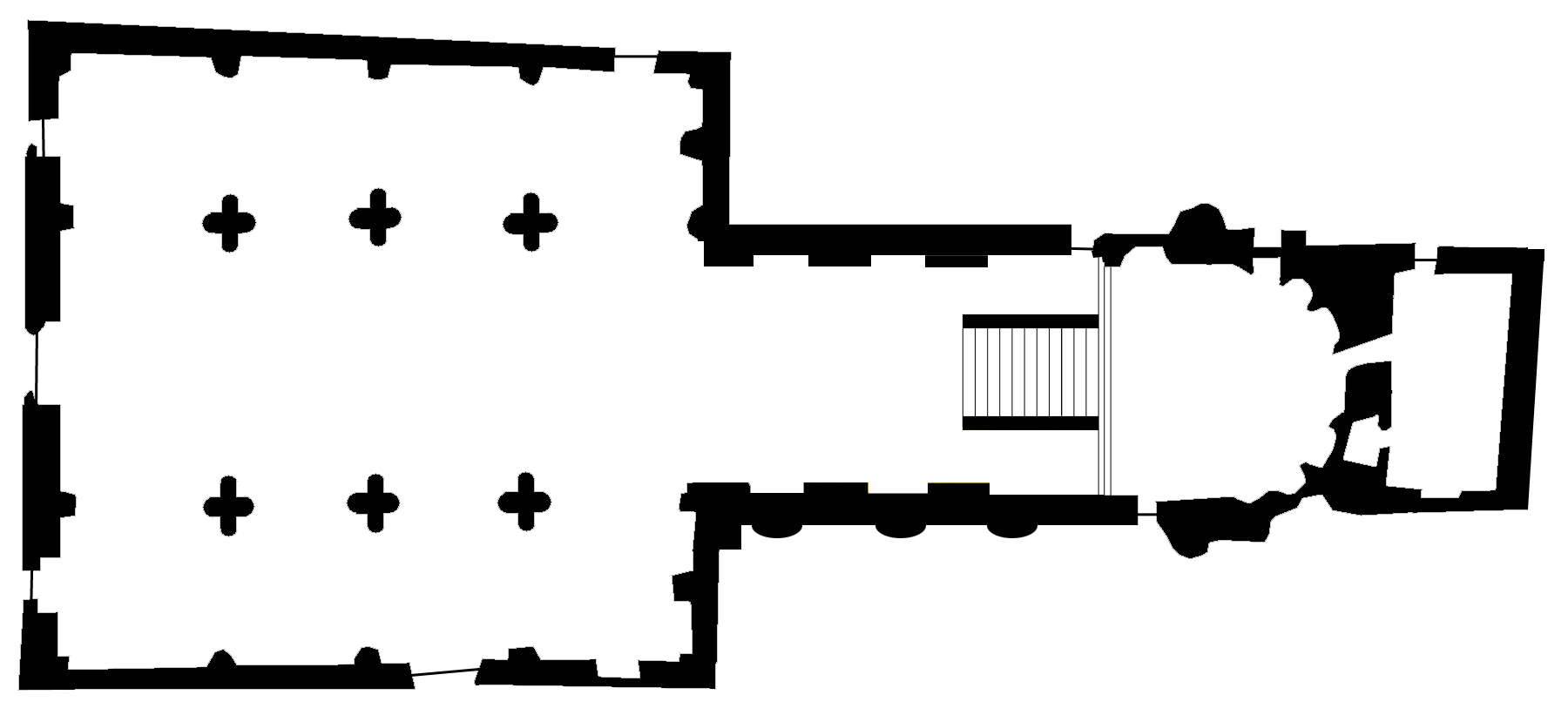 Pianta terza della Chiesa Abbaziale di Leno, richiesto qui.